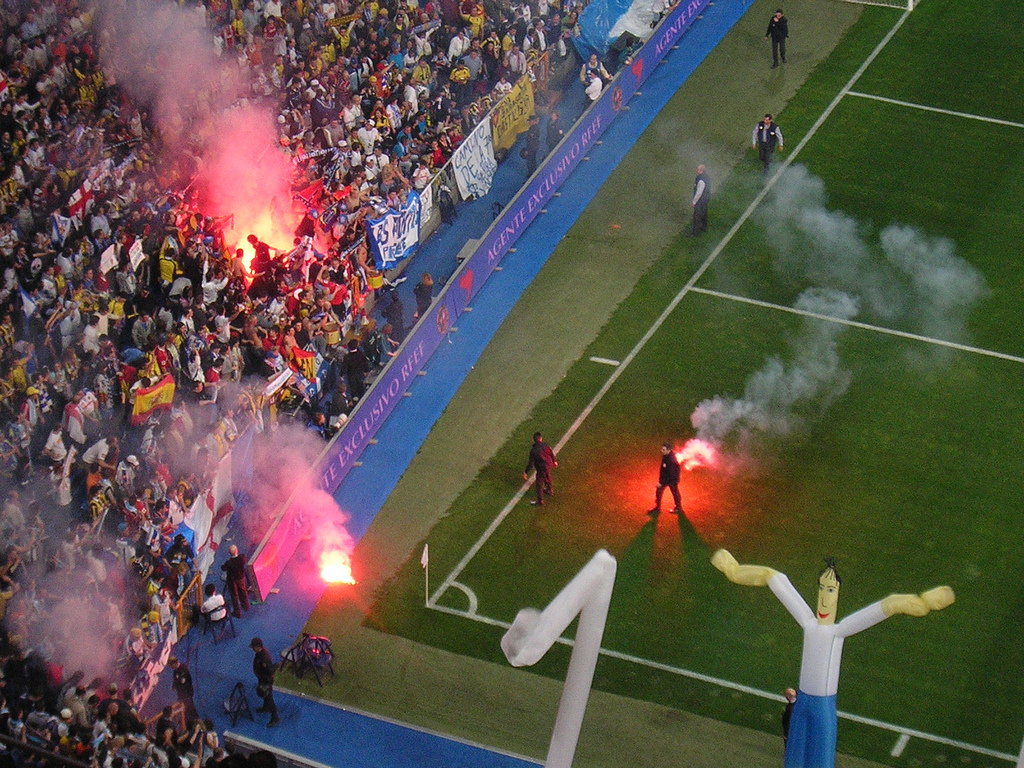 Aragonés: Final d'a Copa d'o Rei de Fútbol 2006 entre o Real Zaragoza y o Espanyol de Barzelona (Estadio Santiago Bernabeu, Madrid, España)Final de la Copa del Rey 2006